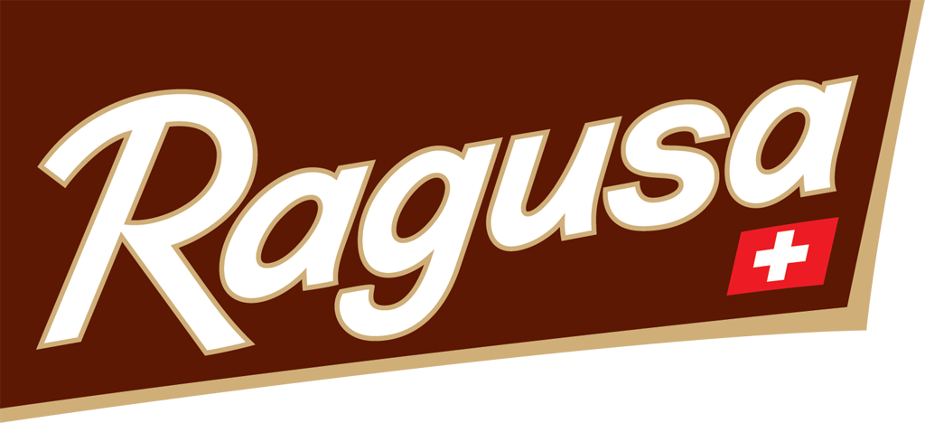 Logo von Ragusa